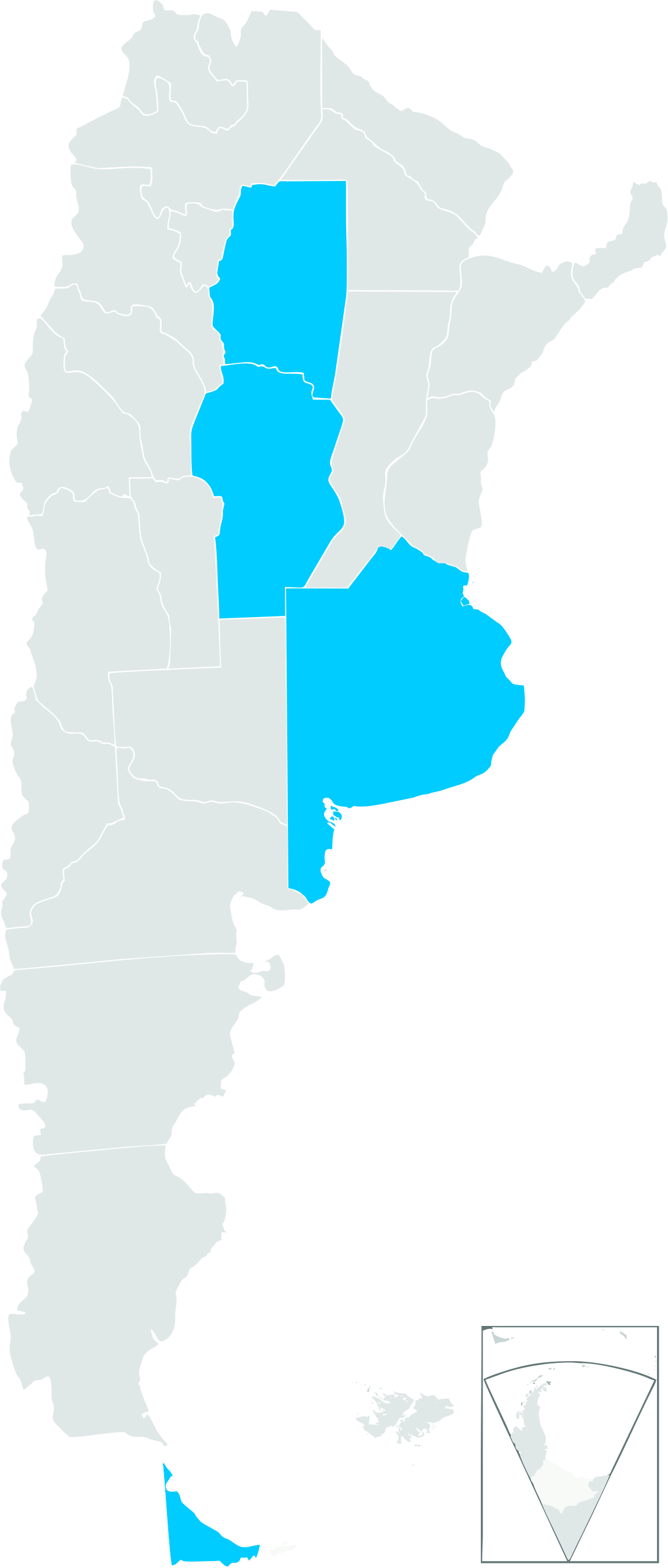 Provincias Argentinas donde esta presente.